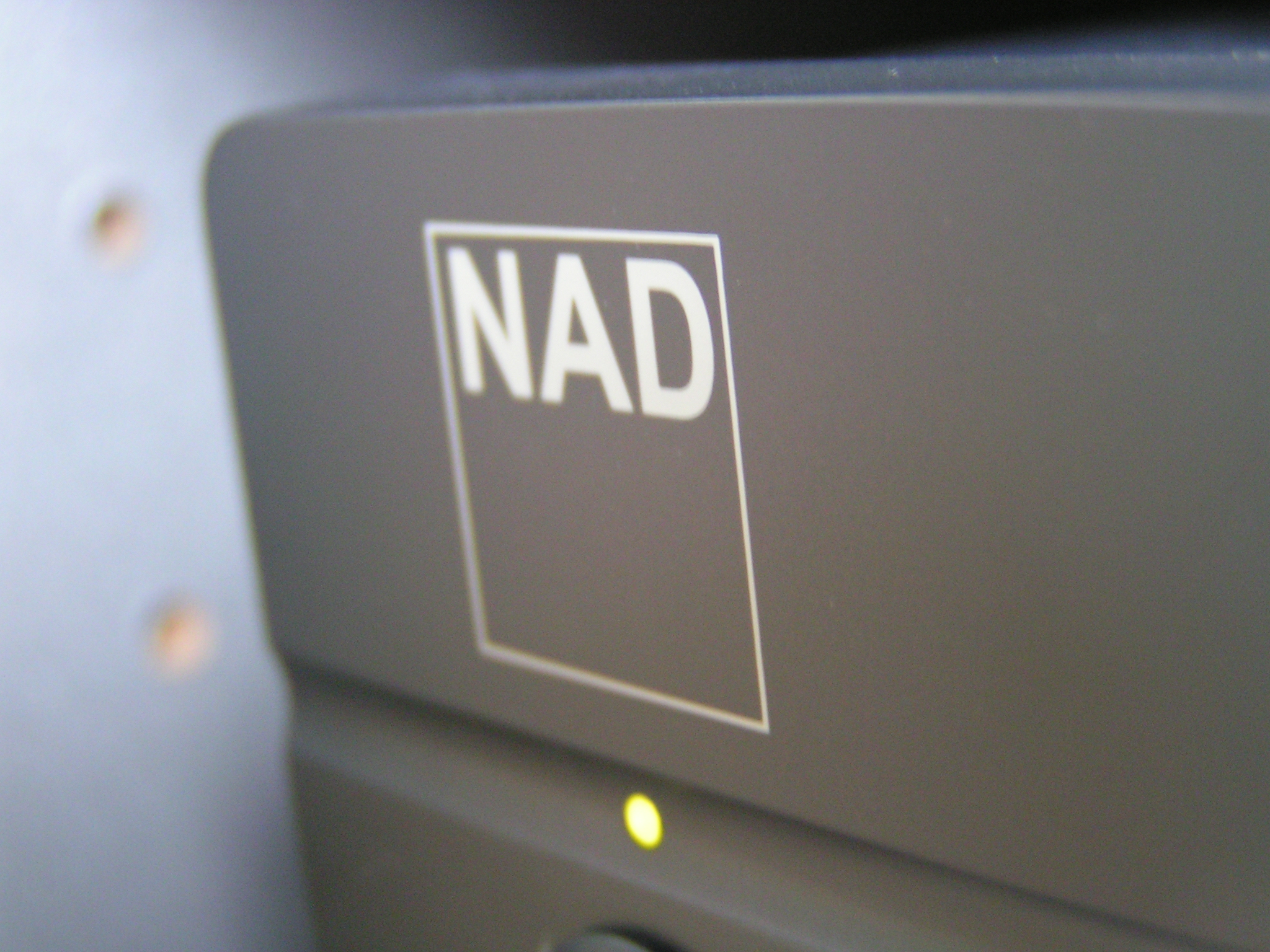 Zelf getrokken, vrij van Auteursrechten